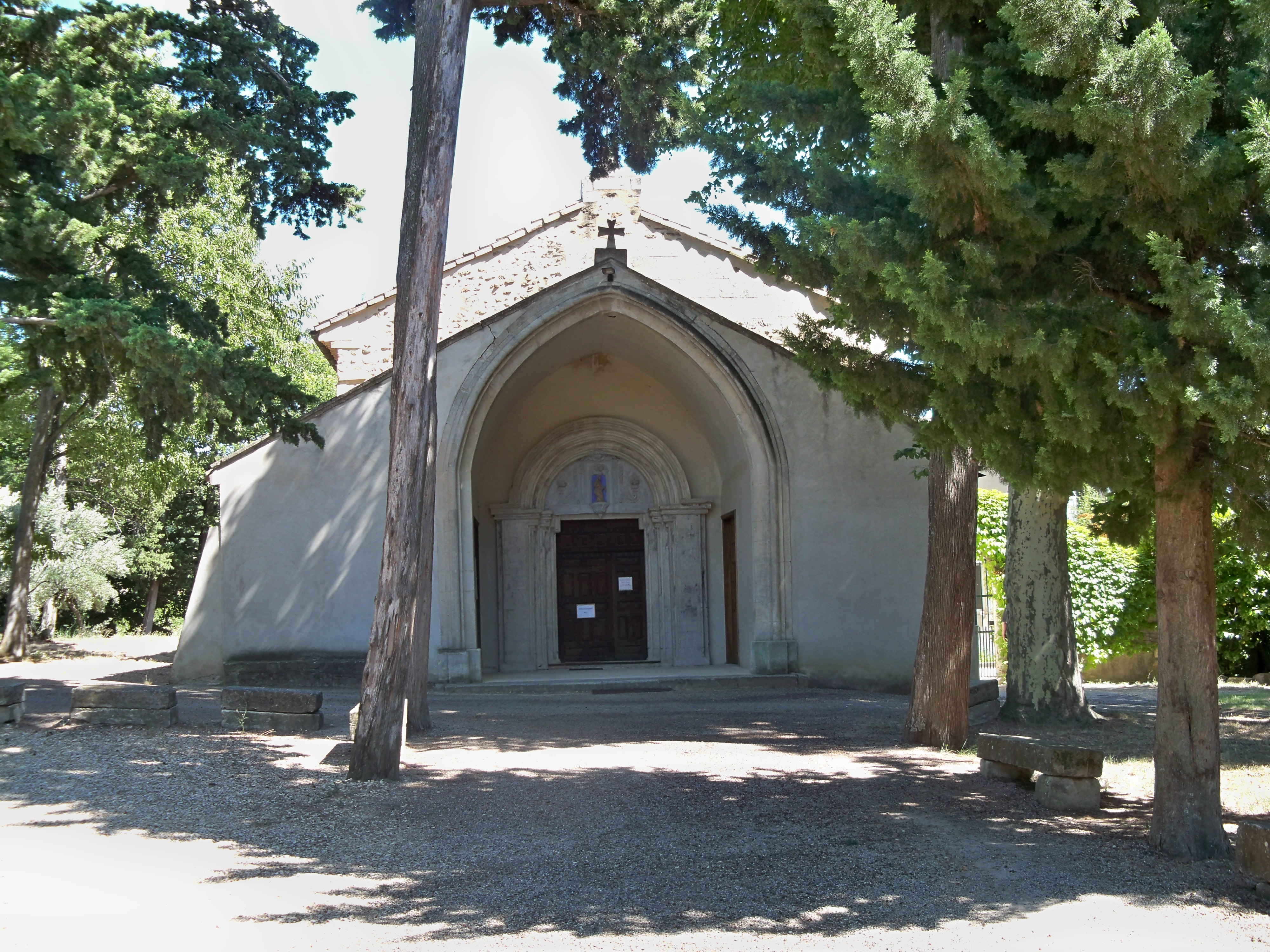 Facade de la Chapelle Notre Dame des Vignes de Visan, Vaucluse, France